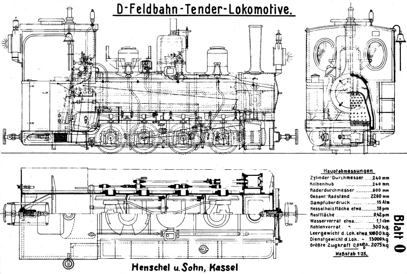 Rysunek opracowany w zakładach Henschel & Sohn przedstawiający Brigadelokomotive w wersji zmodernizowanej (obniżająca się w przedniej części górna krawędź skrzyń wodnych). Lata 1914-18. Reprodukowane w: Alfred B. Gottwald: Heeresfeldbahnen, Transpress, Stuttgart, 1998, ISBN 3-613-70818-3